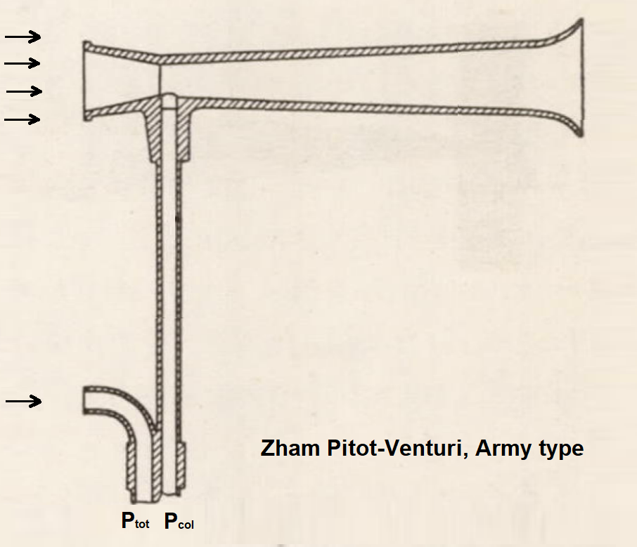 Tube de venturi Zham pour la mesure de la vitesse des aéronefs (modèle Army). Image tirée de Aircraft speed instruments, K. Hilding Beij, NACA Report No. 420, 1941 [